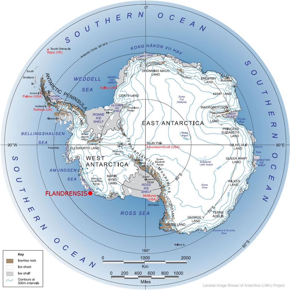 Территории, на которые претендует Великое Герцогство Фландренсис